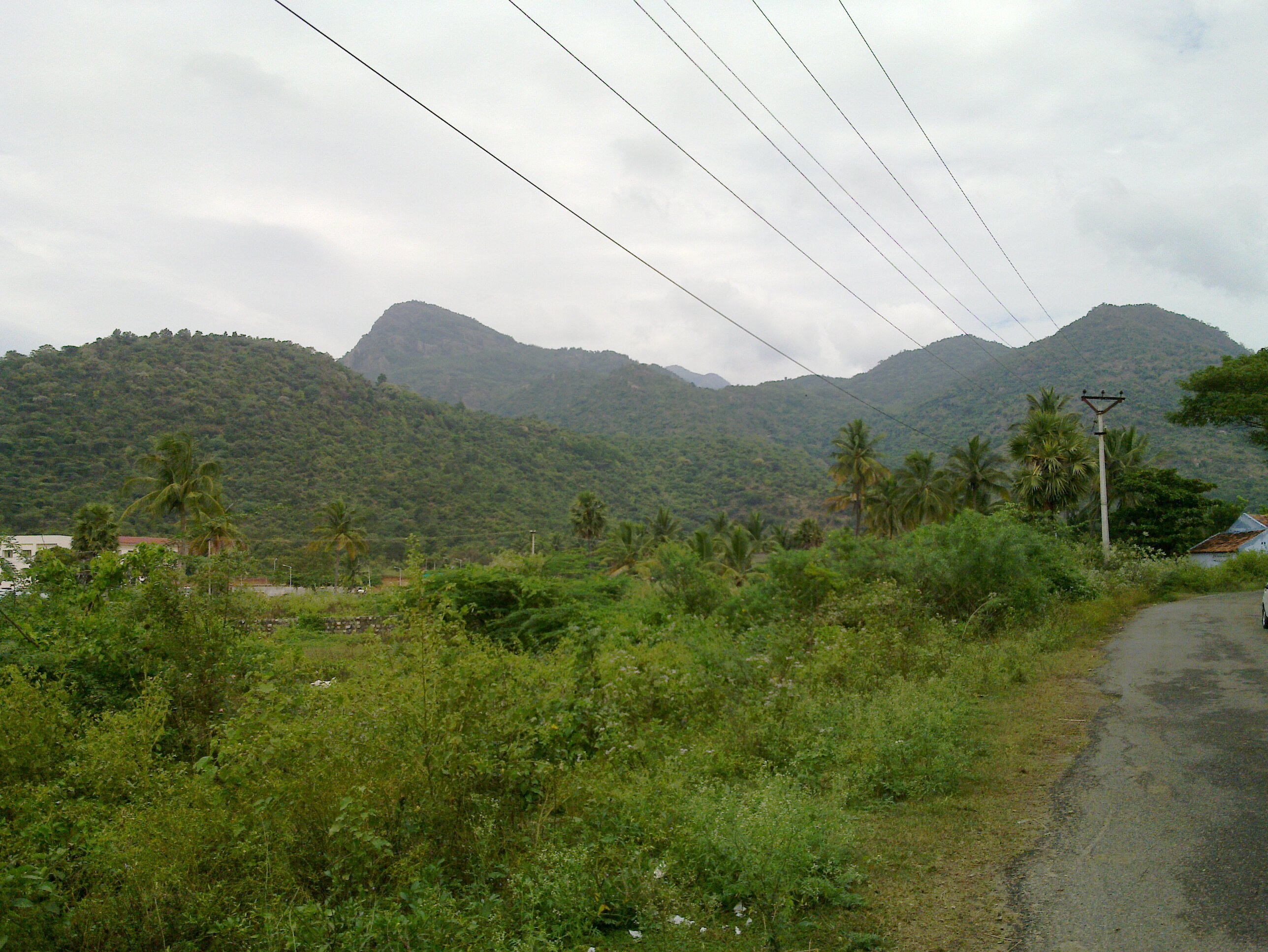 ஏற்காடு மலை-ஒரு பார்வையில்